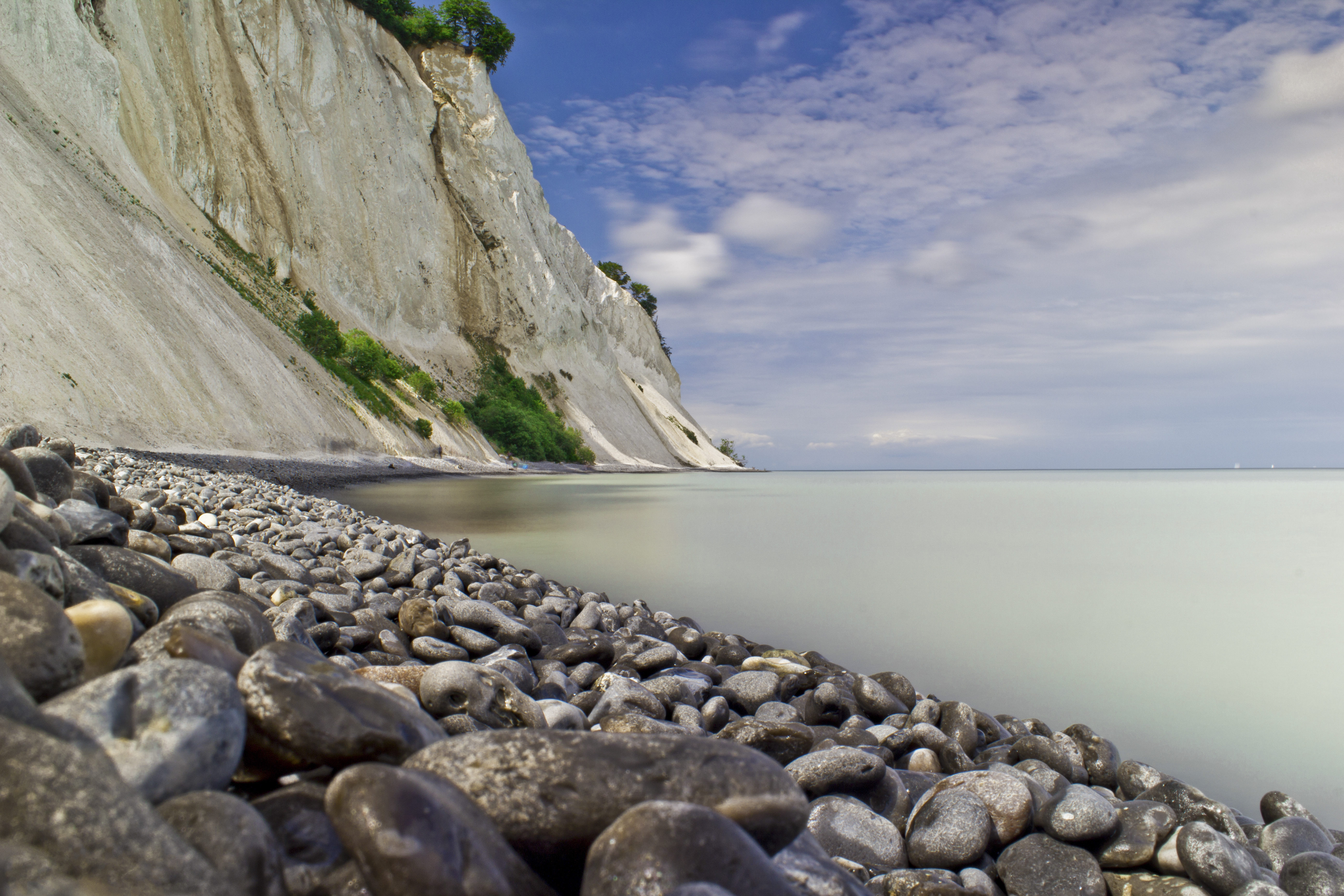 Vu depuis le bas de Møn.